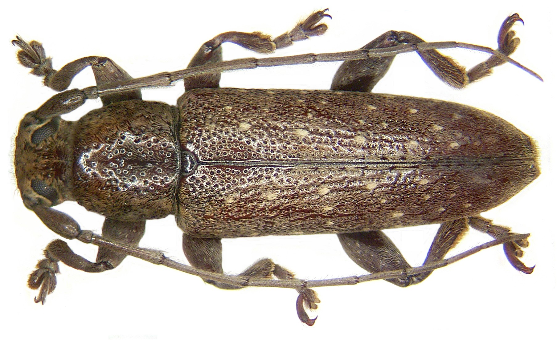 Familie: Cerambycidae Grösse: 16 mm Fundort: Indonesien, Molukken, Hiri Isl., Ternate leg. A.Skale, 2006; det. A.Weigel Foto: U.Schmidt, 2006